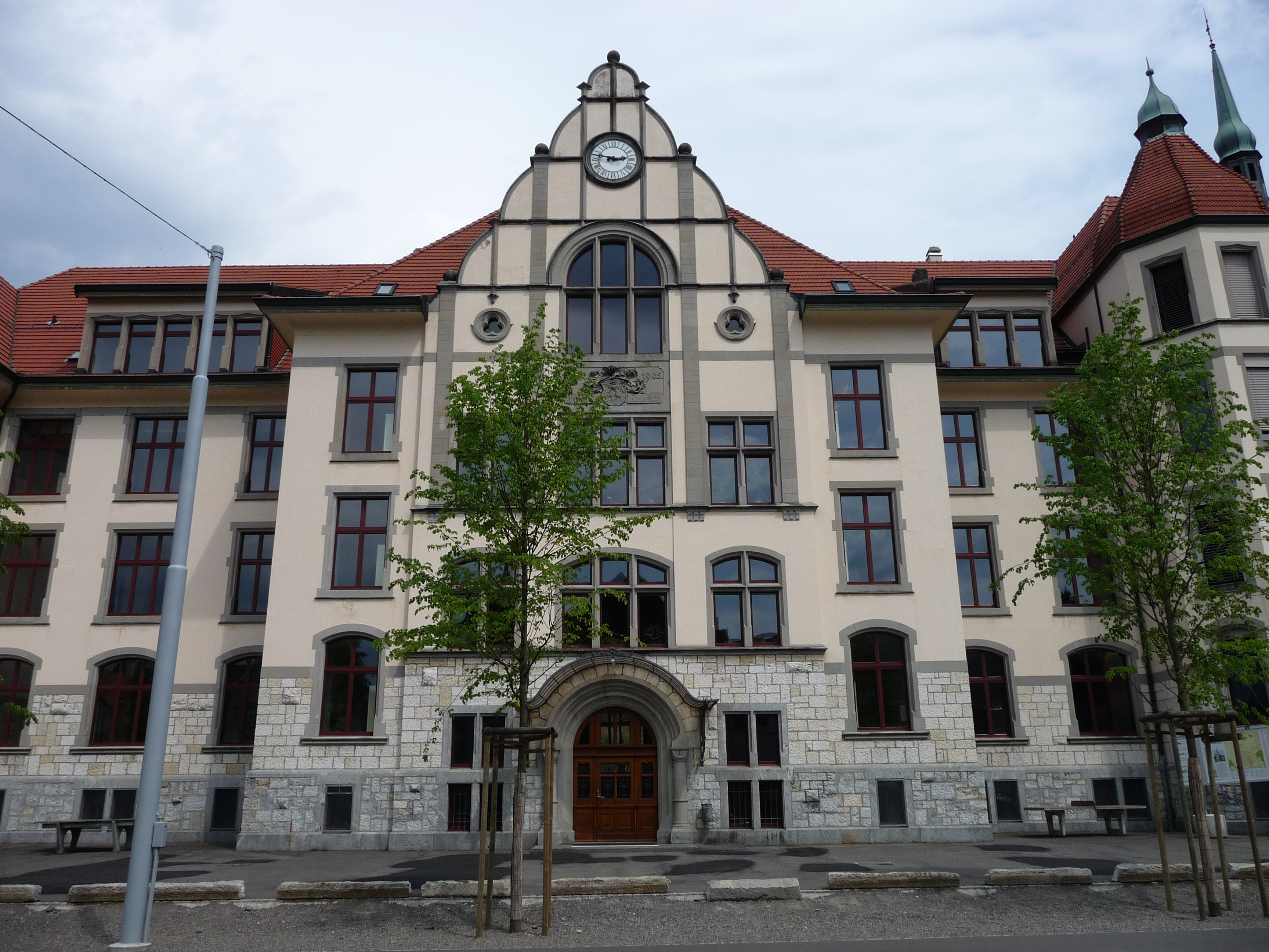 Schulhaus in Reinach